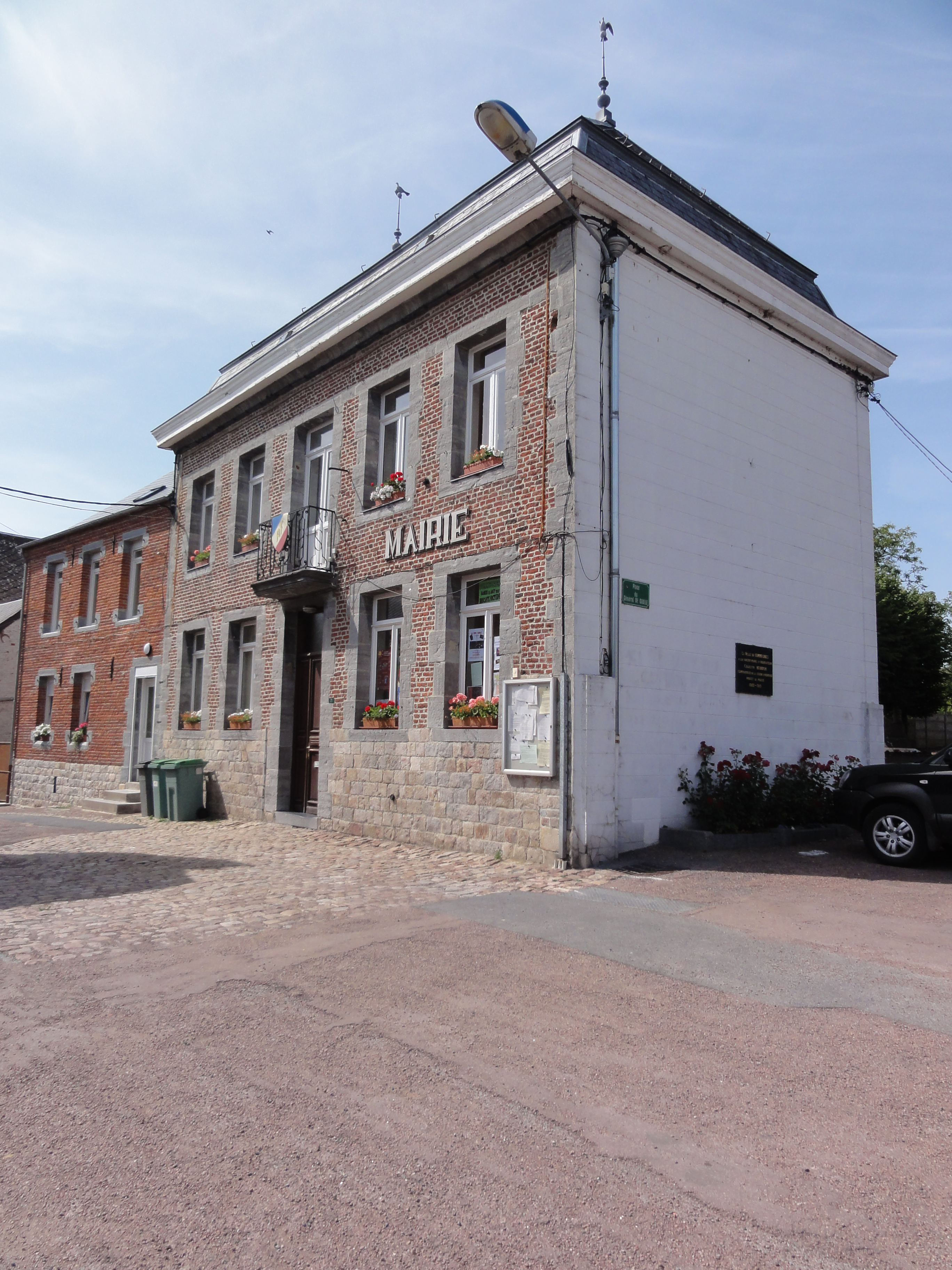 Gommegnies (Nord, Fr) mairie